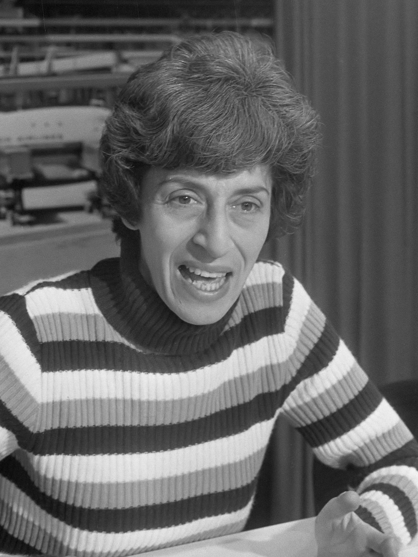 Carmel Budiardjo , een Engelse mensenrechtenactiviste die in Indonesische gevangenissen heeft gezeten, geeft een persconferentie op Schiphol. De activiste tijdens de persconferentie 8 december 1973